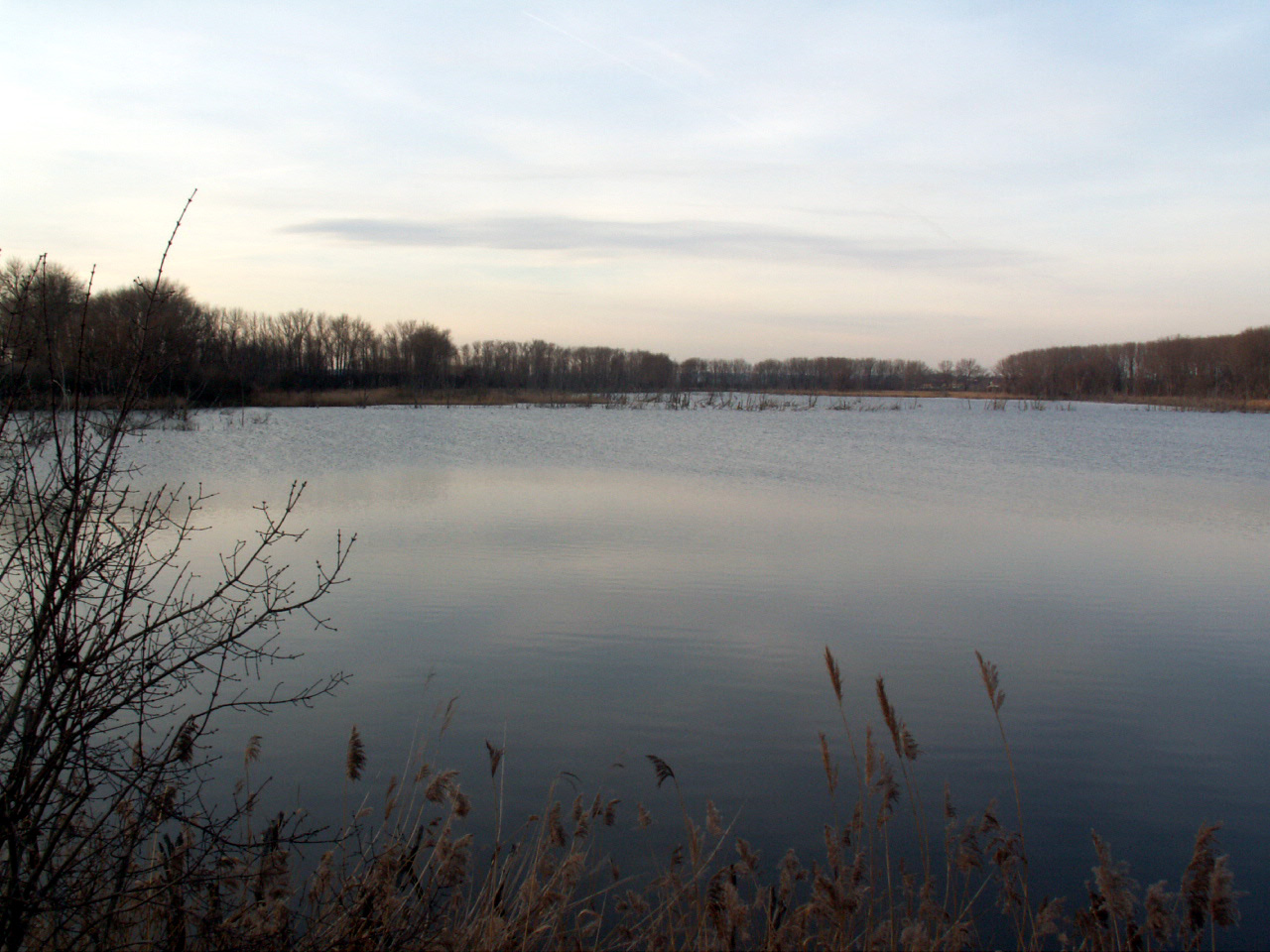 Am Aschersleber See